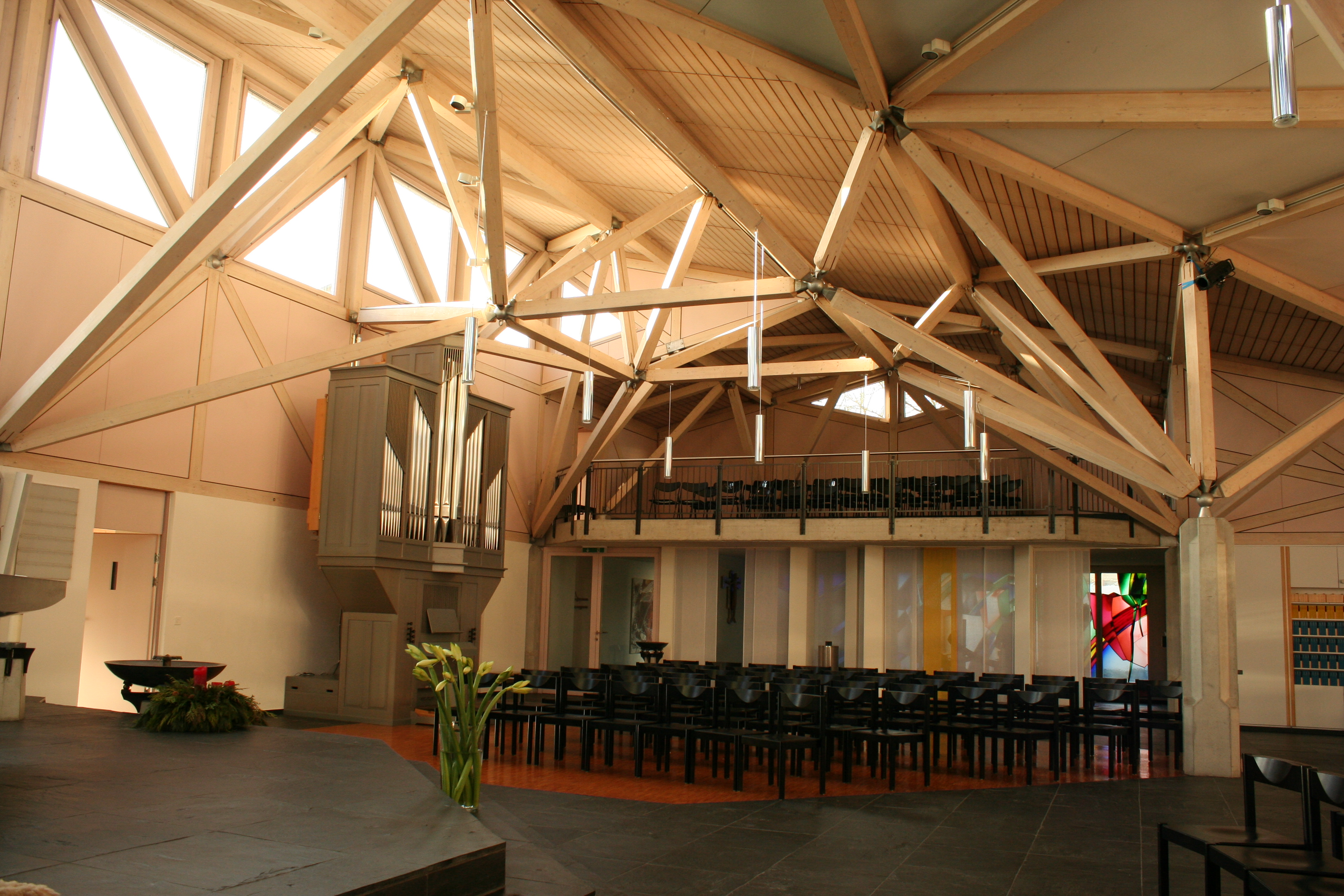 Römisch-katholische Kirche St. Katharina von Siena Fällanden, Innenansicht